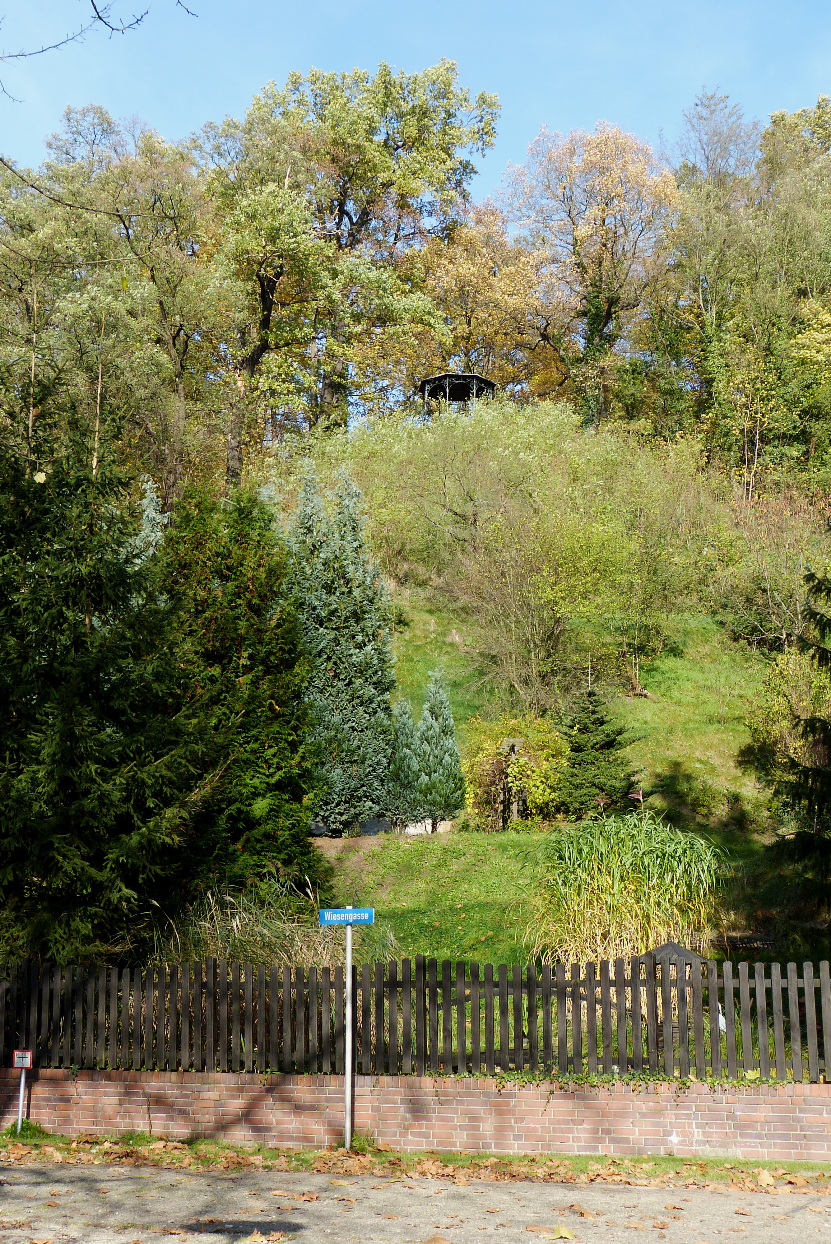 Sicht auf die Anhöhe des Georgenberg von der Stadt aus gesehen. Oben im Bild ist der Seemann Pavillon, welcher sich im Stadtpark auf dem Georgenberg befindet, zu erkennen.